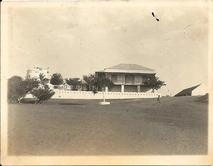 Tranqueira in Letefoho/Port. Timor in den 1920ern